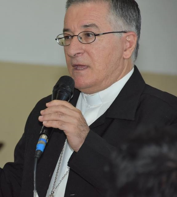 Bispo de Santos